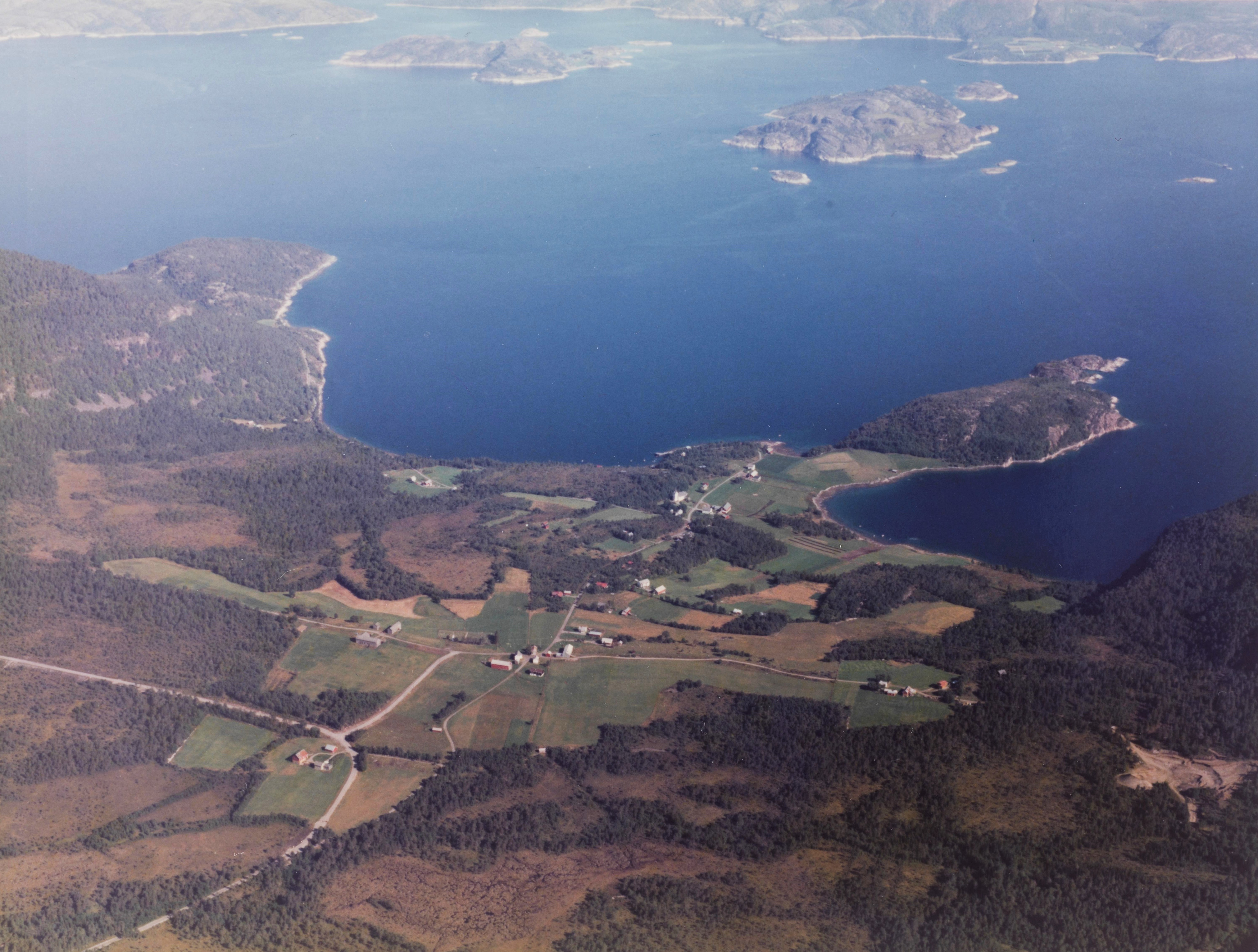 Heimsjøen i Hemne kommune i Sør-Trøndelag fylke.